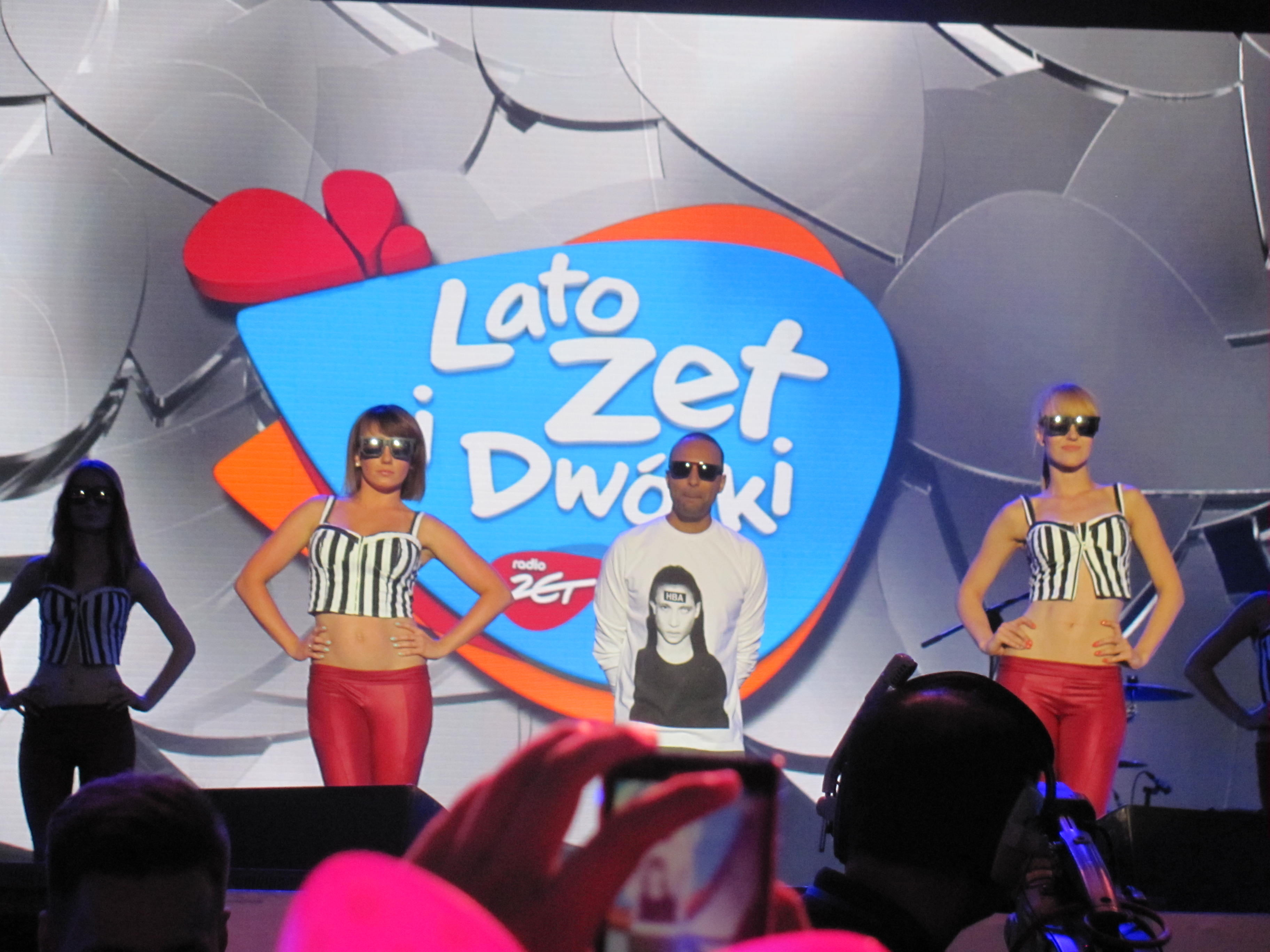 Koncert Lato Zet i Dwojki 2014 w Toruniu